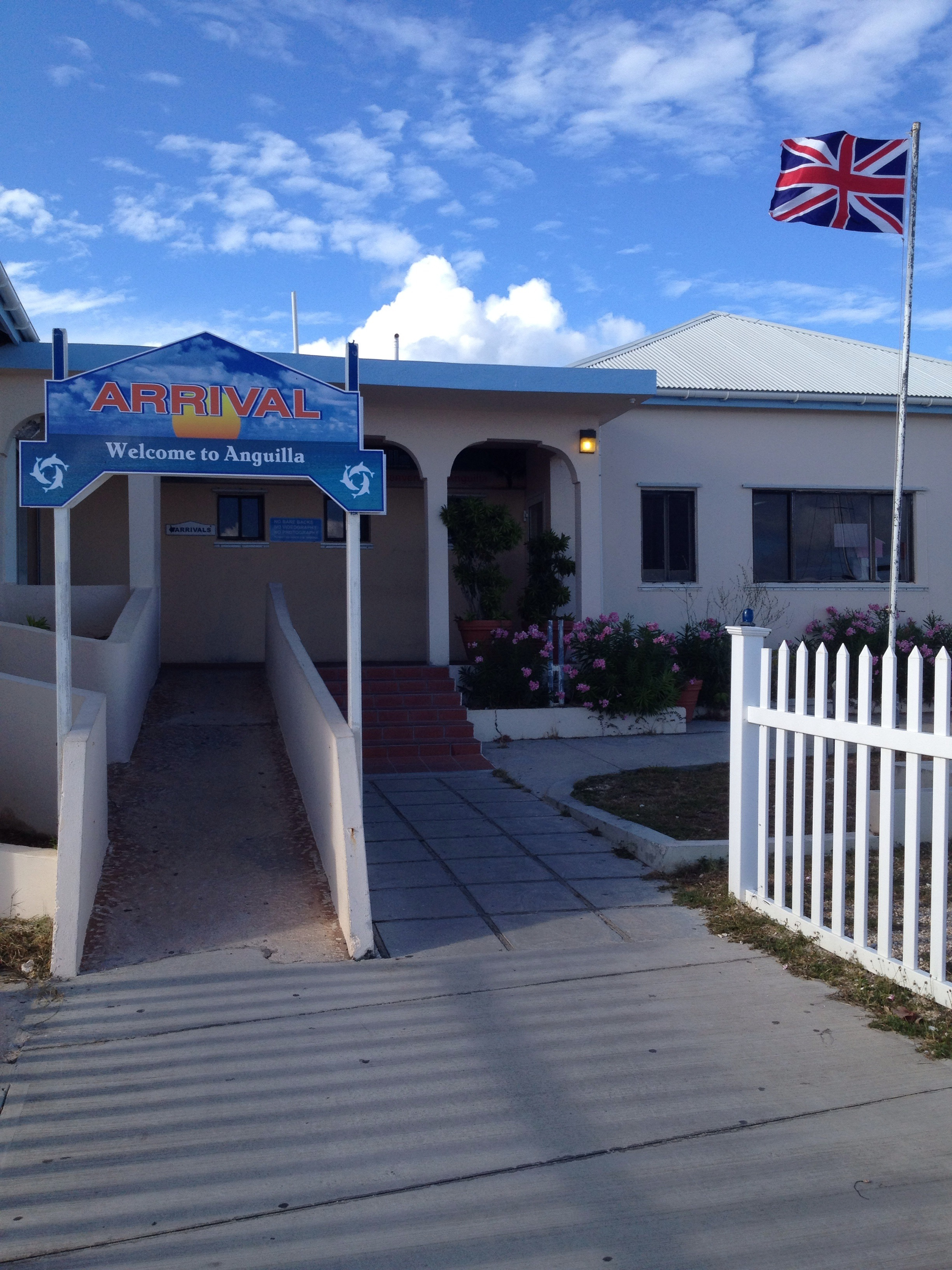 Welcome to Anguilla